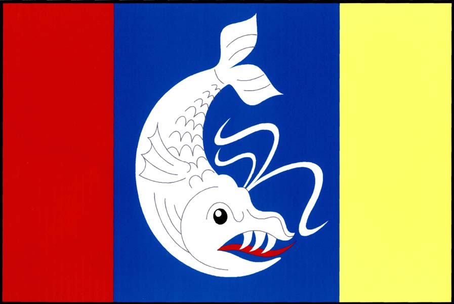 Vlajka obce Kratonohy